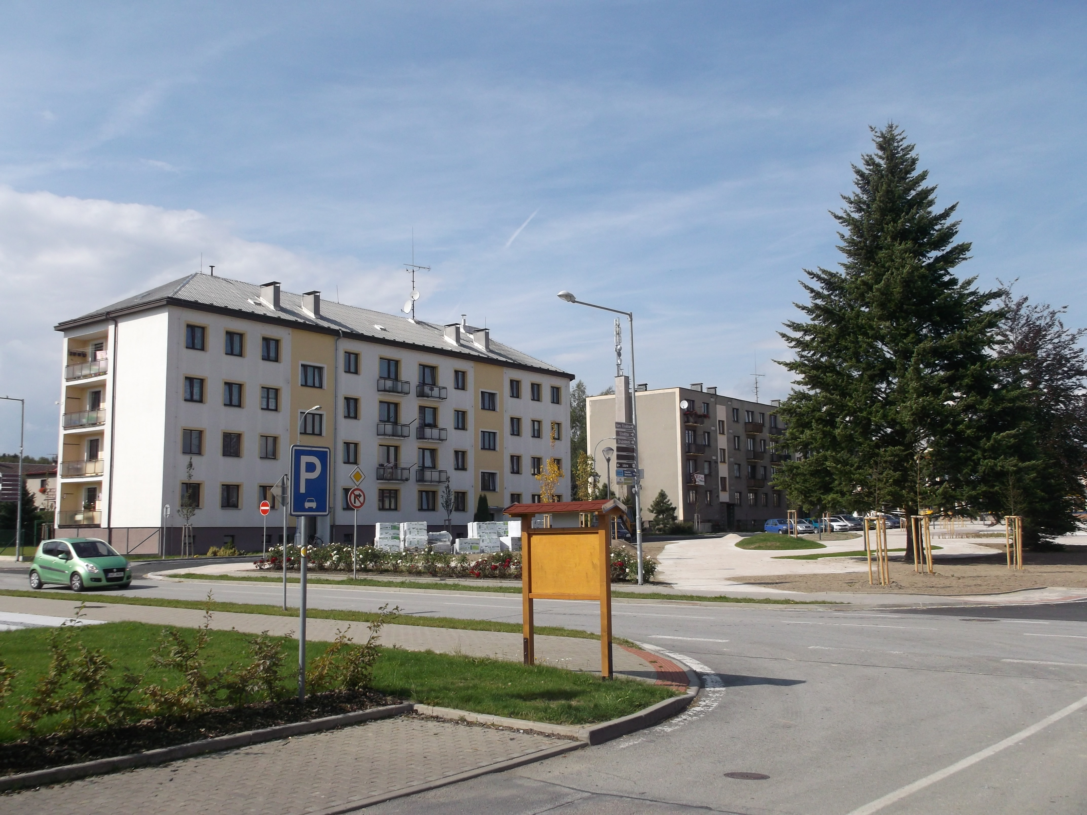 Ždírec nad Doubravou - náměstí 9. května